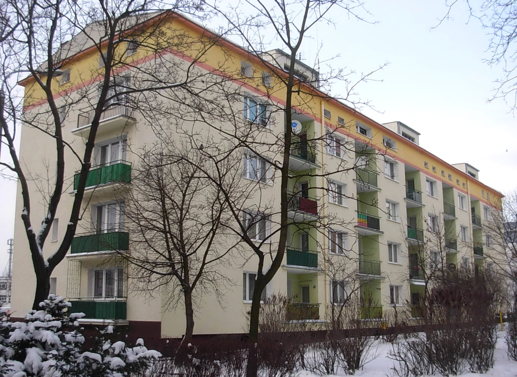 Zabudowa na osiedlu Kapuściska w Bydgoszczy